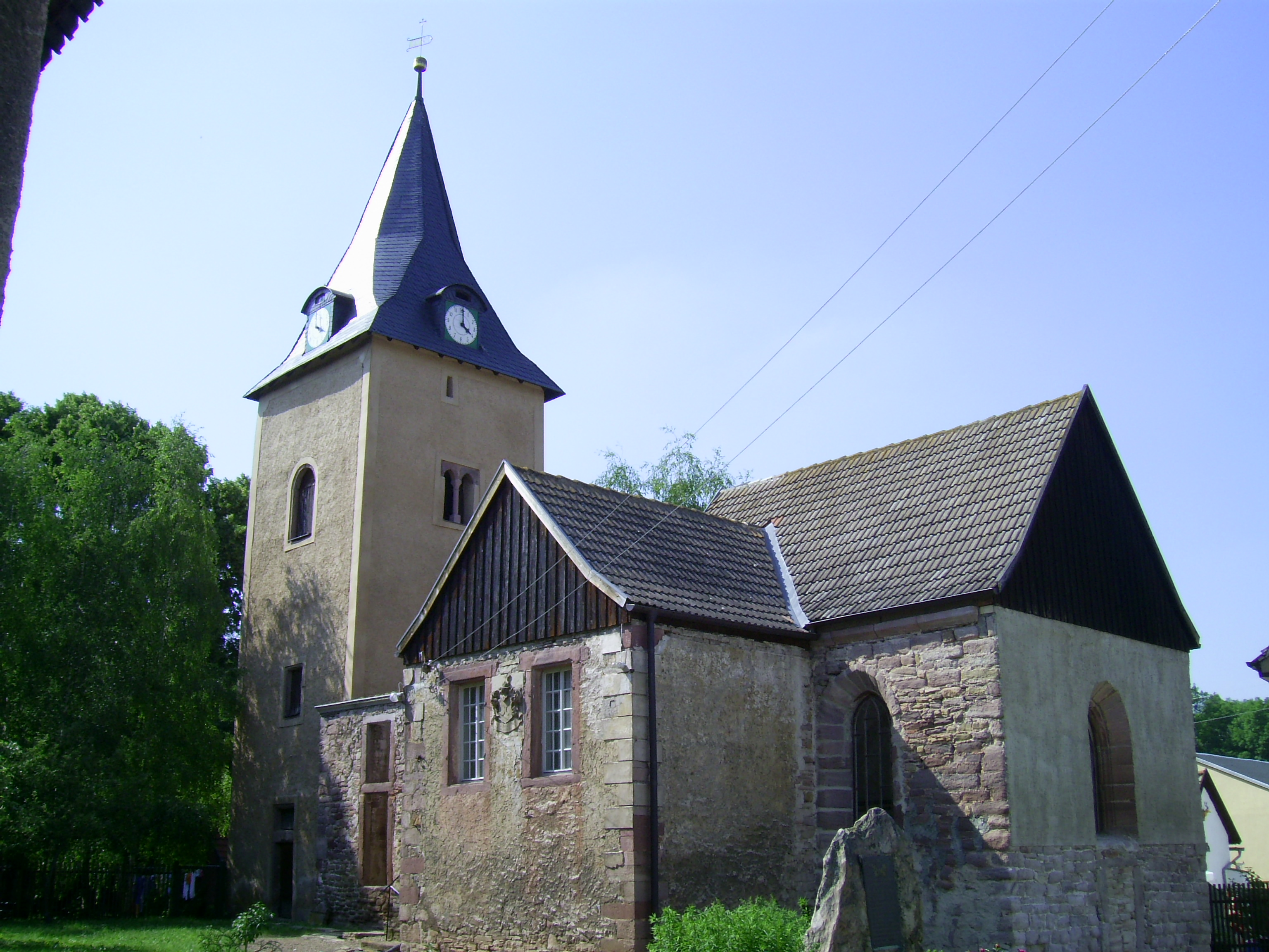 Kirche der Gemeinde Hackpfüffel, Kreis Sangerhausen, Sachsen-Anhalt, Deutschland.